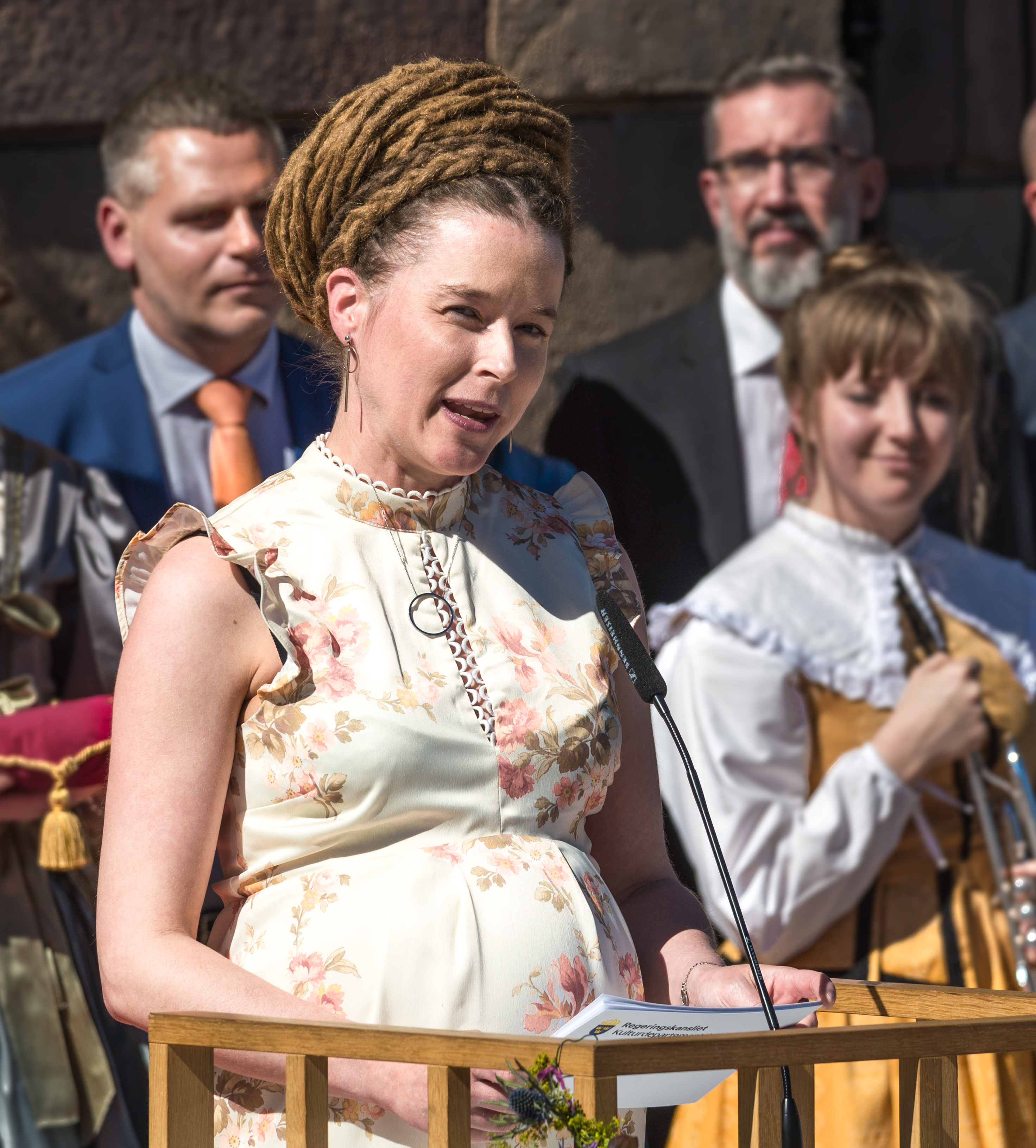 Amanda Lind nyinviger Livrustkammaren den 17 juni 2019 i närvaro av Carl XVI Gustaf och drottning Silvia.